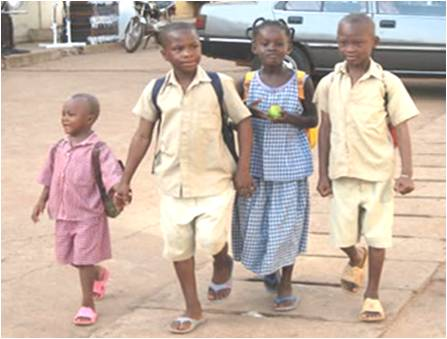 Elèves de l'enseignement primaire sur le chemin de l'école en Côte d'Ivoire (Nord)